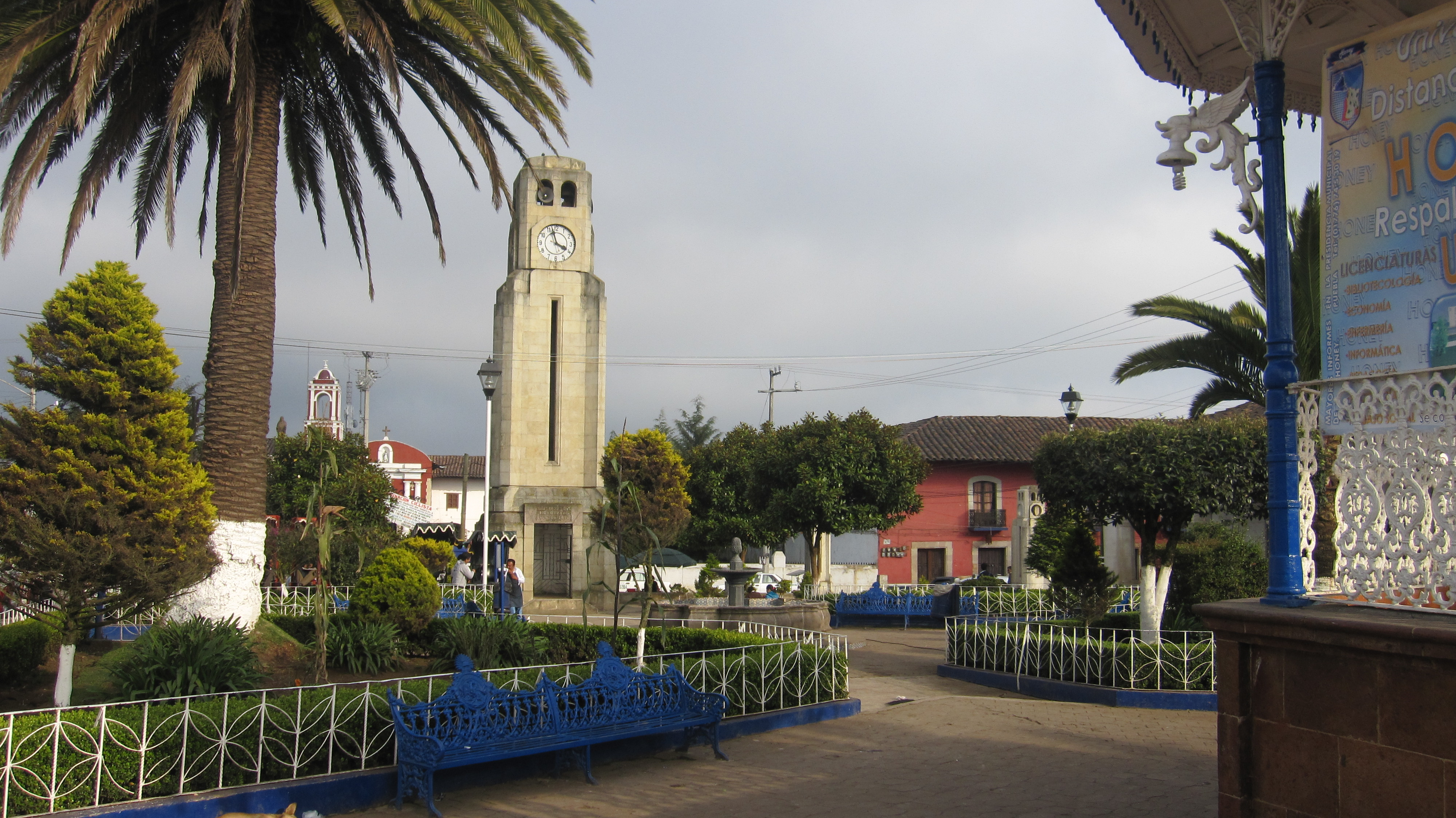 Vista desde el kiosko de la plaza principal.